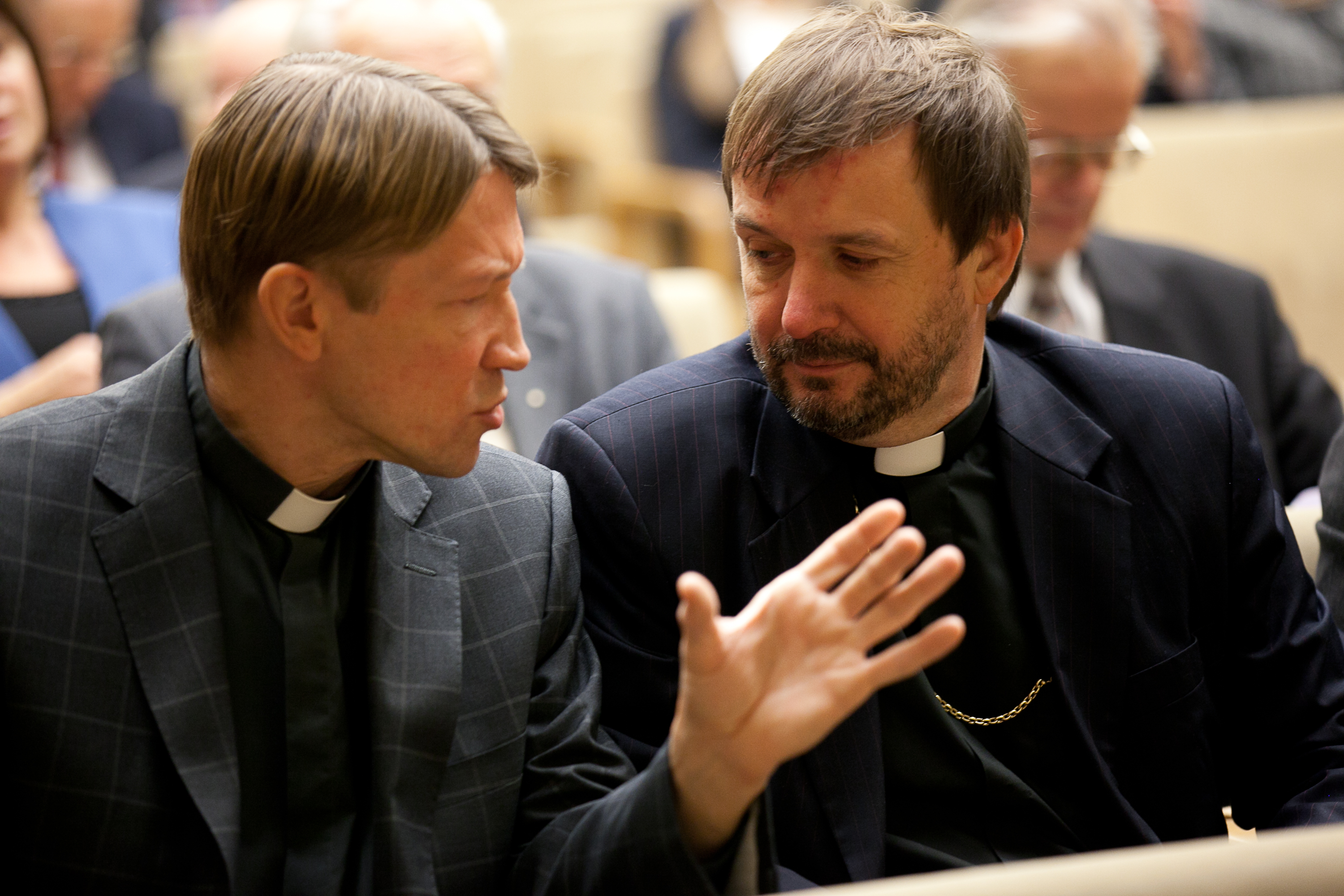 2011.gada 28.novembris. Cicerona balvas pasniegšanas ceremonija. Jānis Vanags un Juris Rubenis. Foto: Ernests Dinka, Saeimas Kanceleja